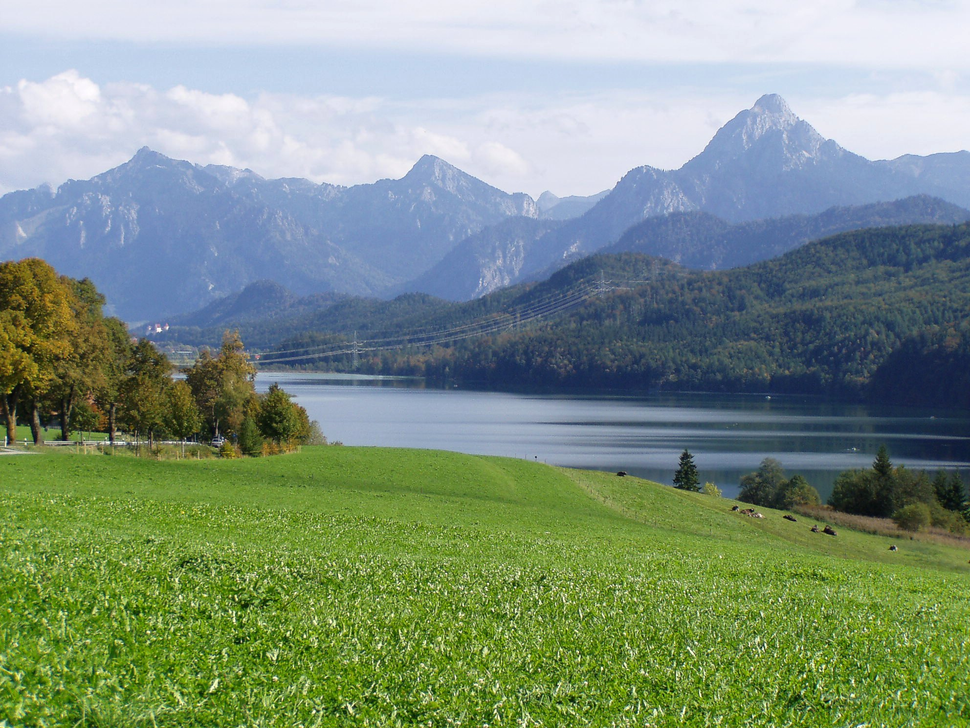 Weißensee bei Füssen